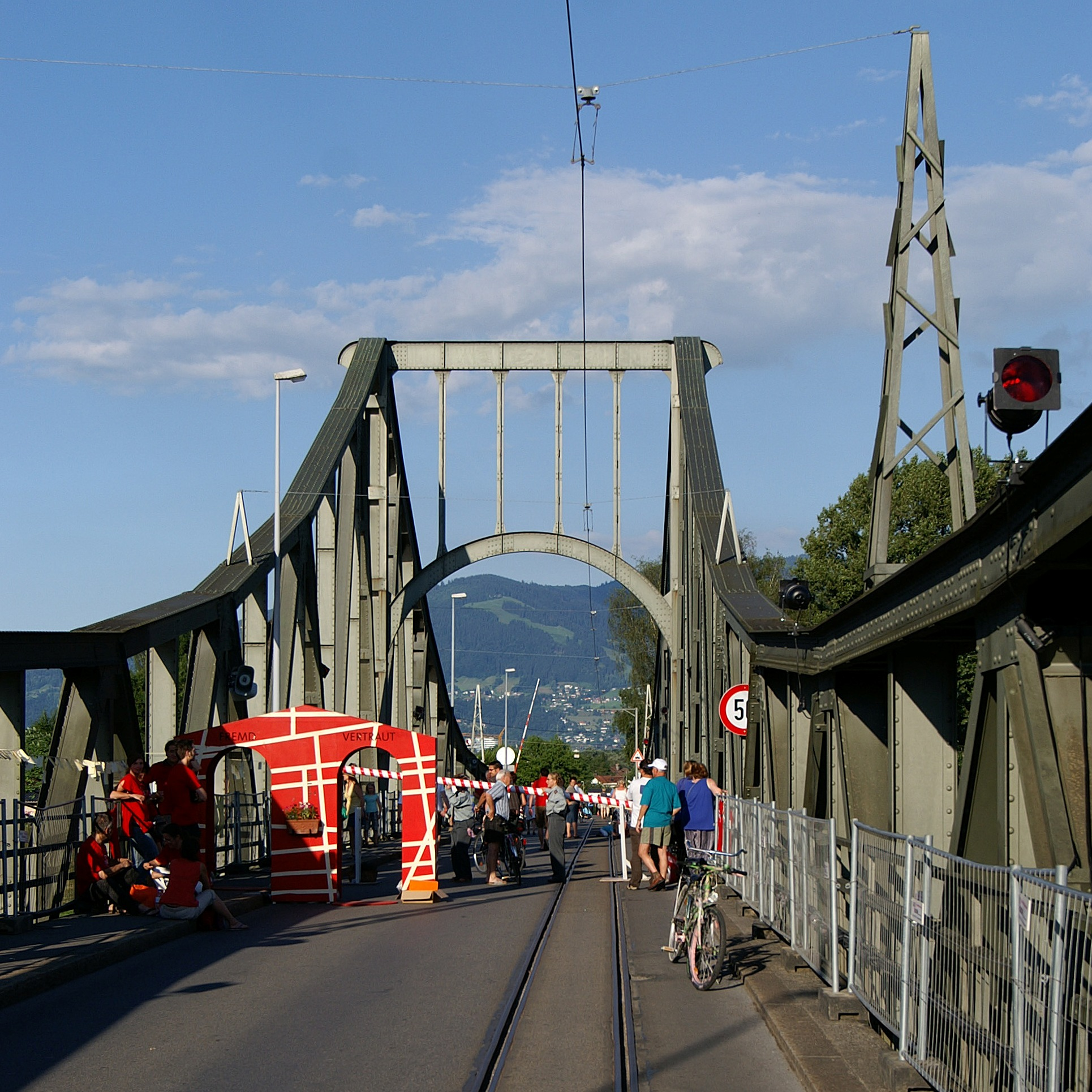 Wiesenrainbrücke über den Rhein. Sie verbindet Österreich mit der Schweiz. Fotografiert anlässlich der "internationalen Ballontage Alpenrheintal" [1] auf dem Brückenfestival [2] in Lustenau und Widnau. Die Brücke steht unter Denkmalschutz.